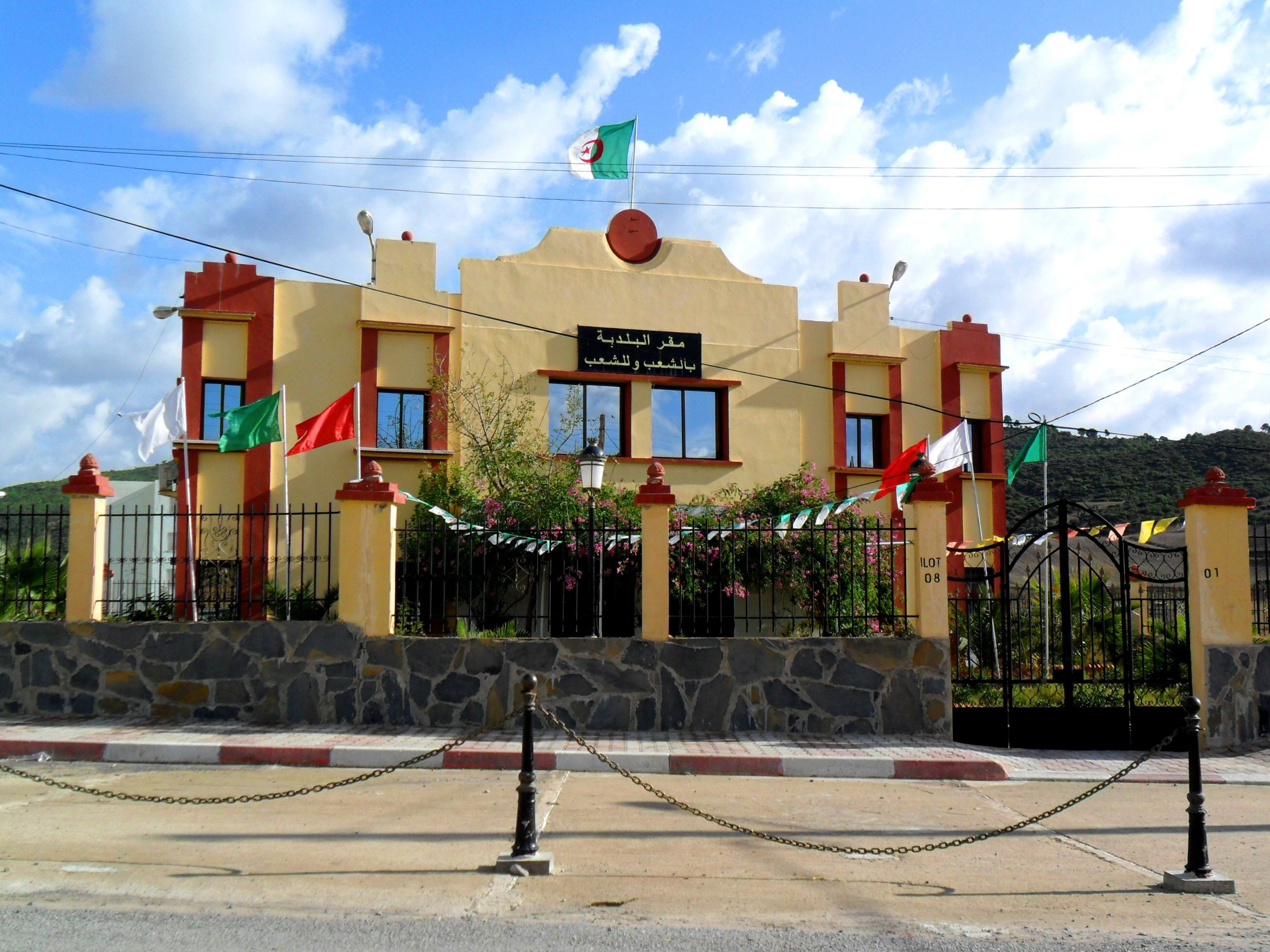 Ouled Bouachra - la mairie اولاد بوعشرة - البلدية